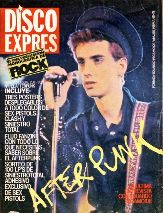 Portada de Disco Expres, hacia 1983 (Tercera época)